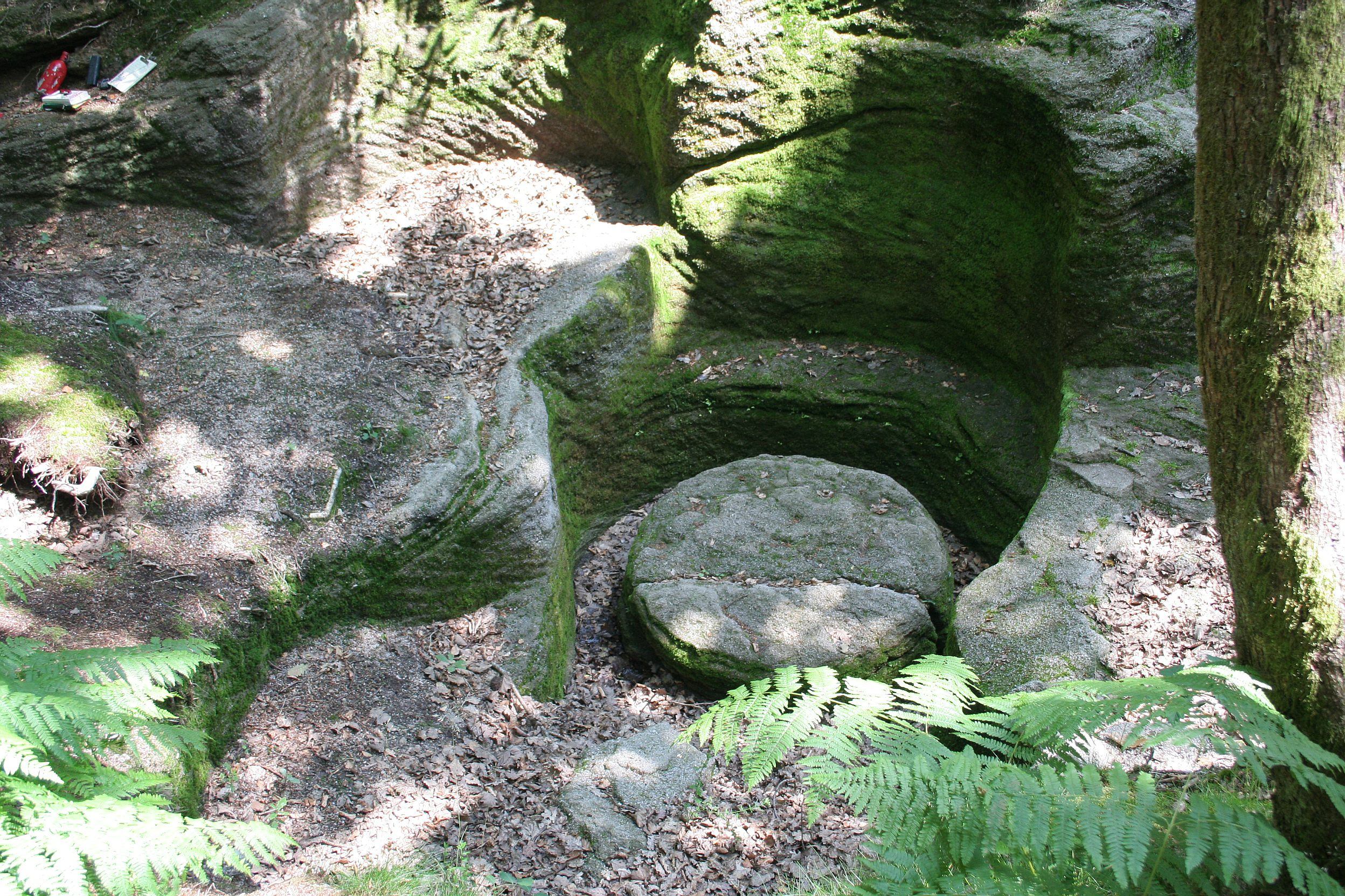 Carrière de meule de grès dans le massif de la Serre